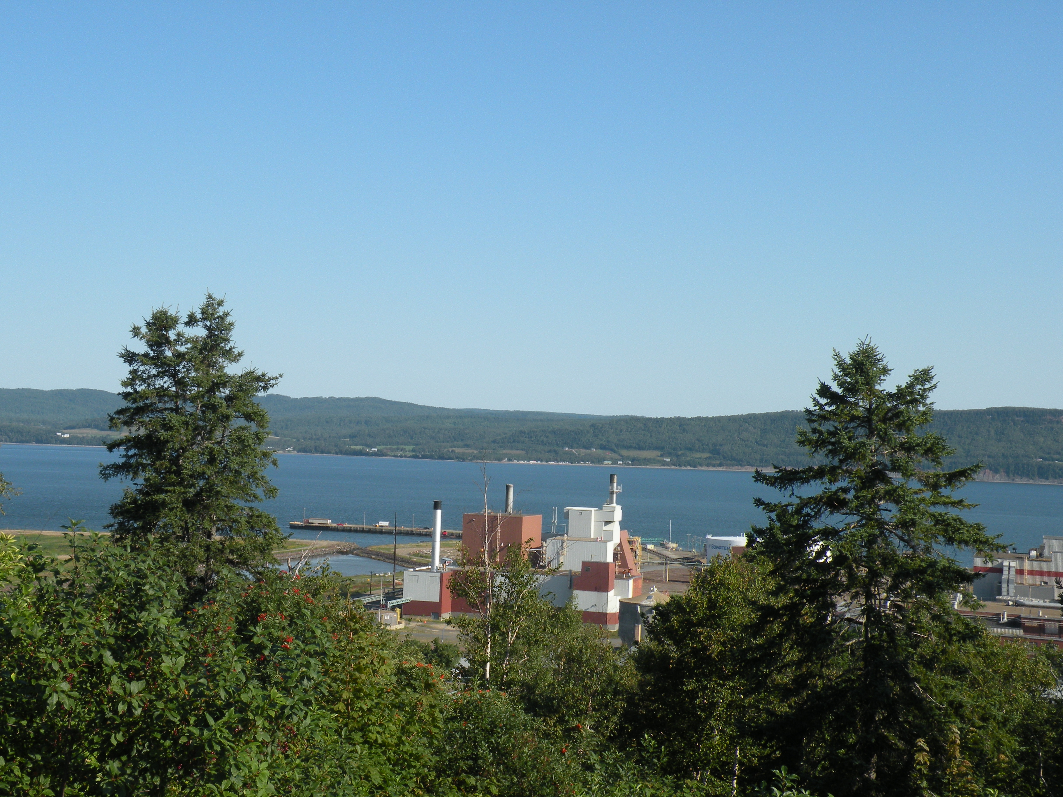 Portrait de l'usine AbitibiBowater de Dalhousie